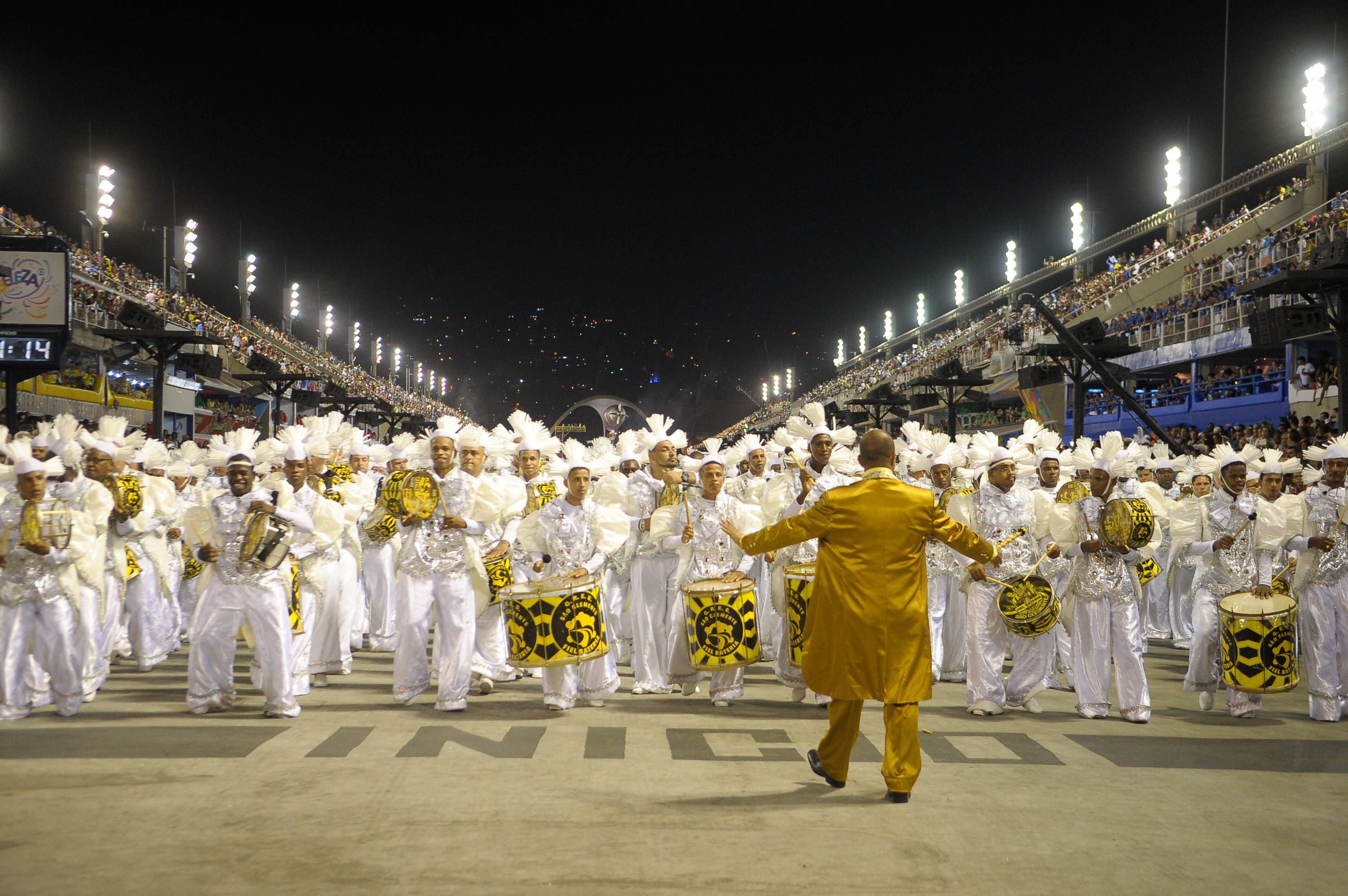 Rio de Janeiro - São Clemente é a terceira escola a se apresentar na Marquês de Sapucaí com o enredo Mais de Mil Palhaços no Salão (Tomaz Silva/Agência Brasil)